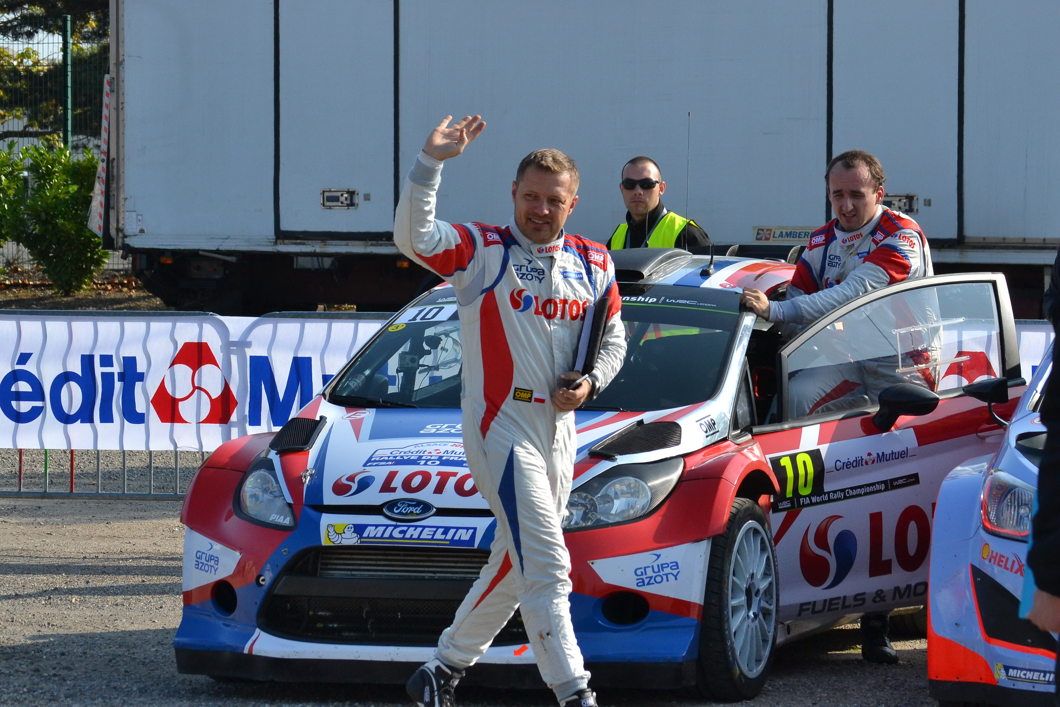 Robert Kubica et Maciej Szczepaniak au parc d'assistance de Colmar durant le Rallye de France-Alsace 2014.